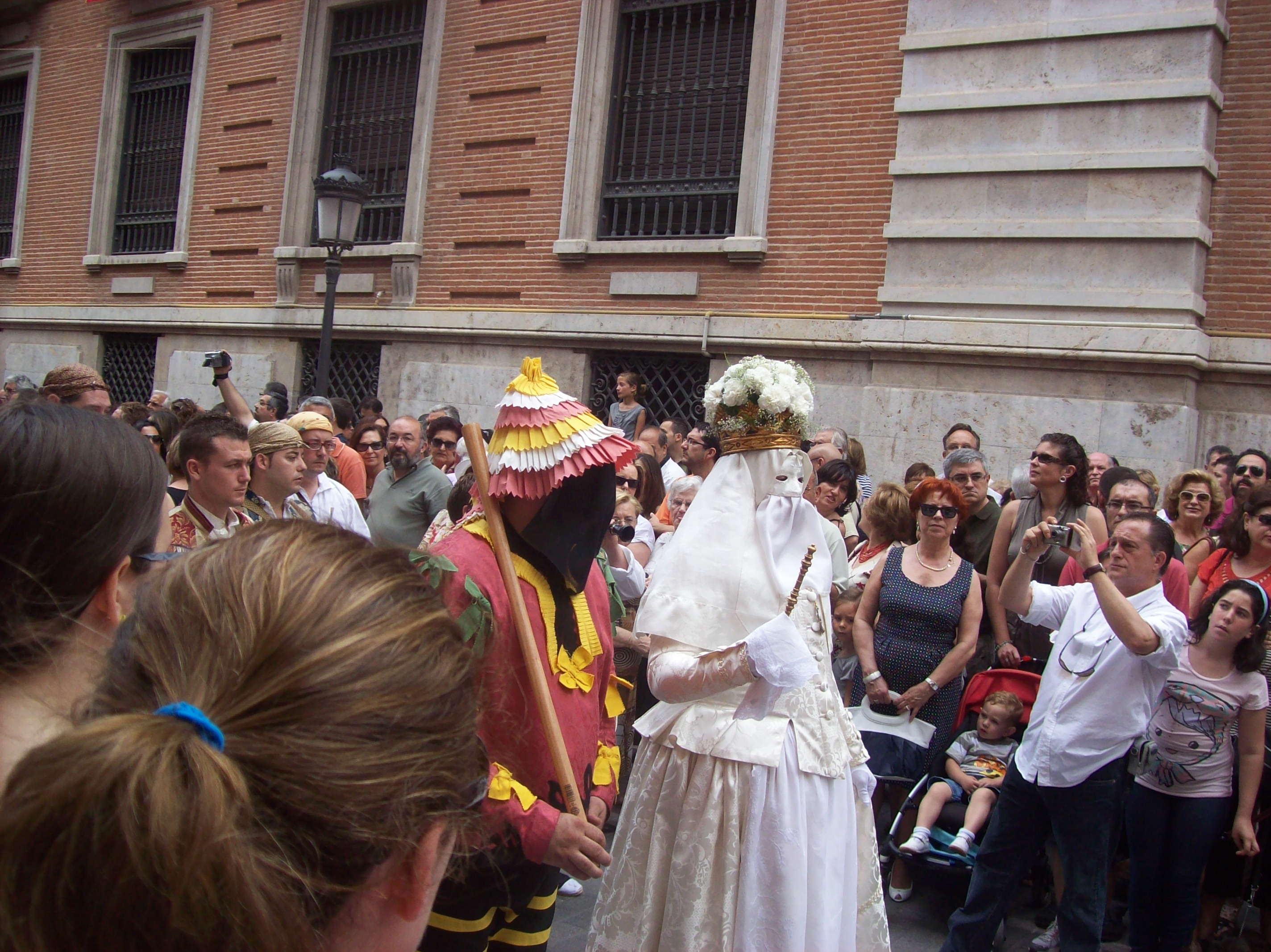 Imágenes de la 'cabalgata del convite' en la fiesta del Corpus de Valencia.